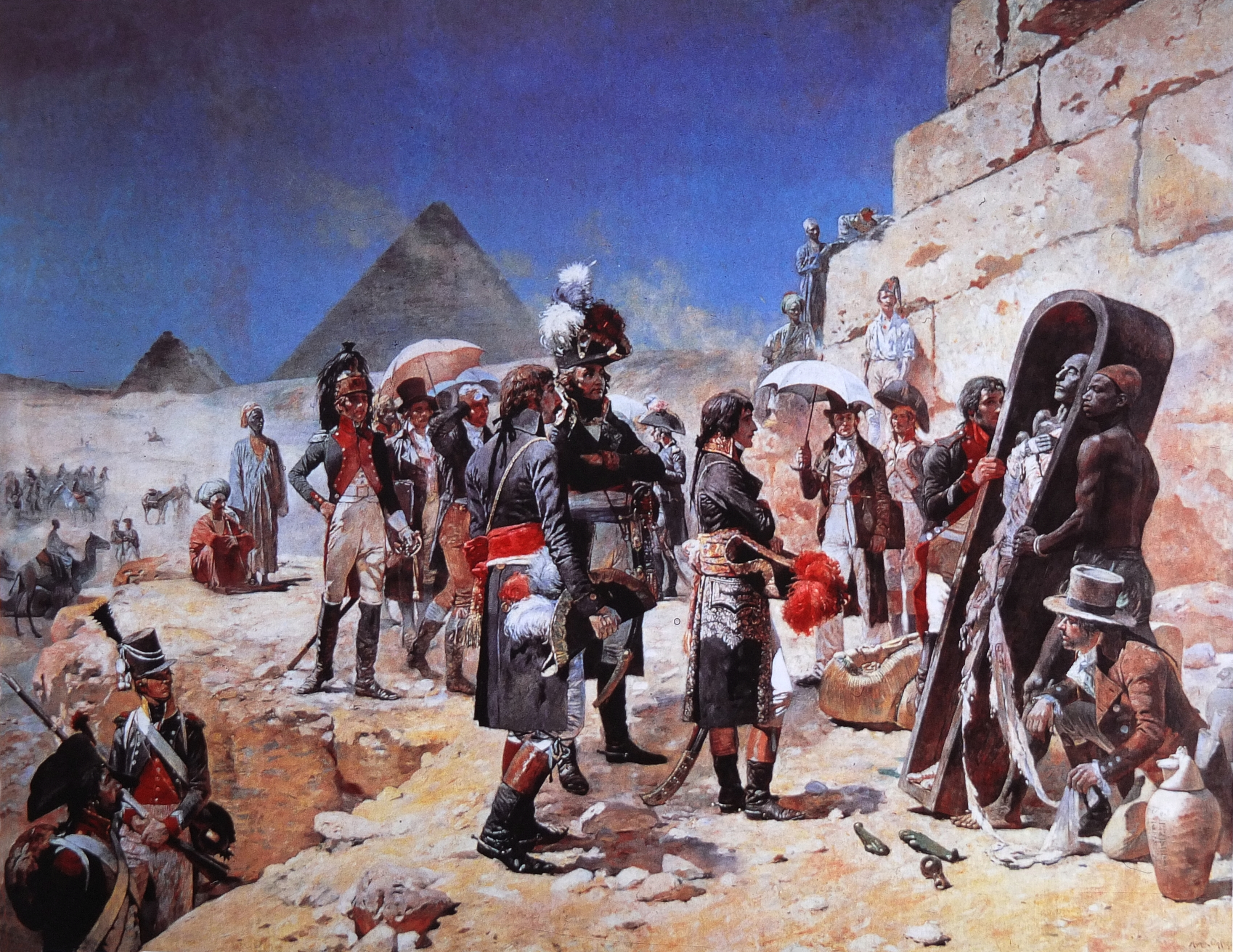 Napoléon Bonaparte devant les pyramides, contemplant la momie d'un roi (1798), Musée d'Art moderne Roger Anacréon, Granville